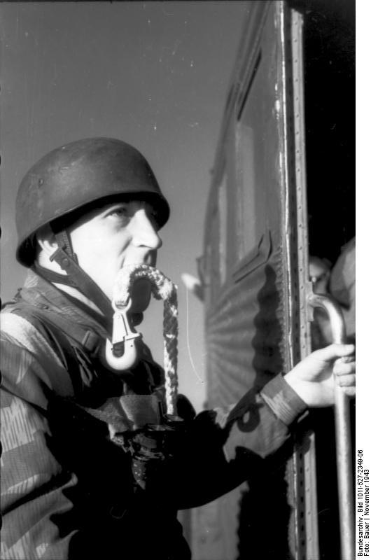 Fallschirmjäger für Leros! Fallschirmjäger machen sich start klar